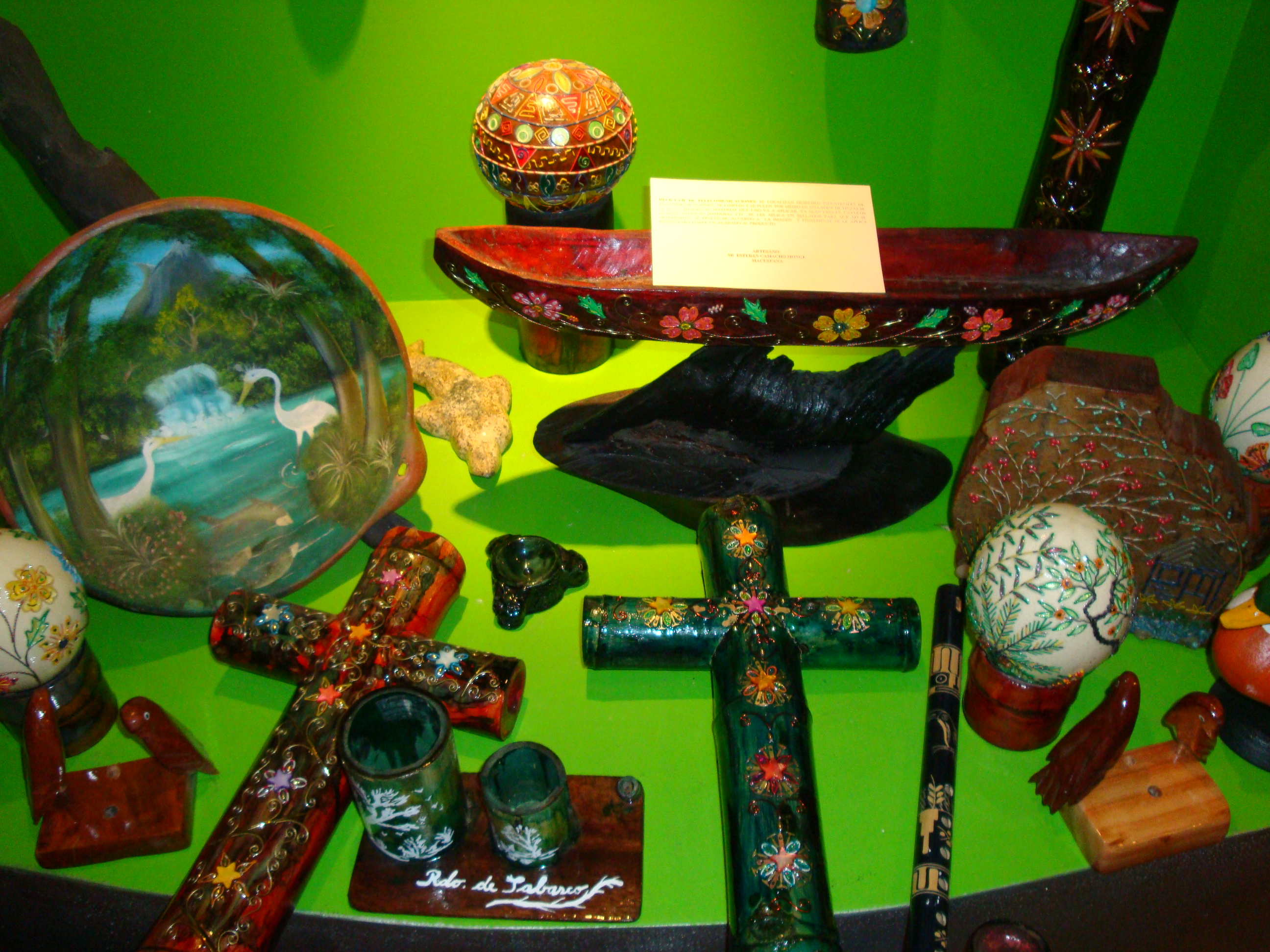 Figuras talladas en madera. Artesanía del municipio de Macuspana, Tabasco, México.